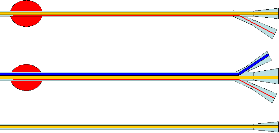 Selbst erstellte Grafik zur schematischen Darstellung von transurethralen Kathetern